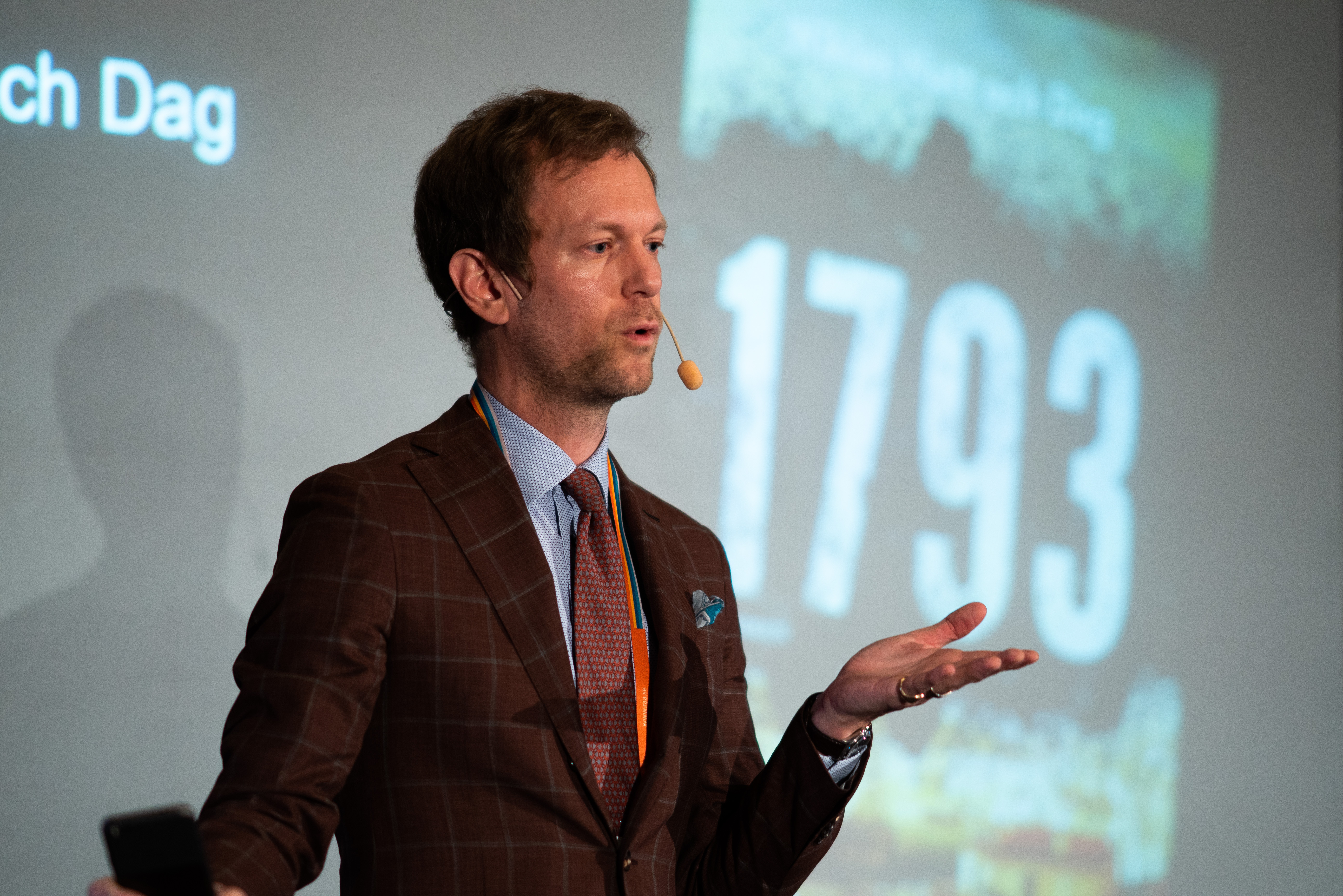 Niklas Natt och Dag på Riksantikvarieämbetets höstmöte 2018. Foto: Fredrik Streiffer (CC BY)